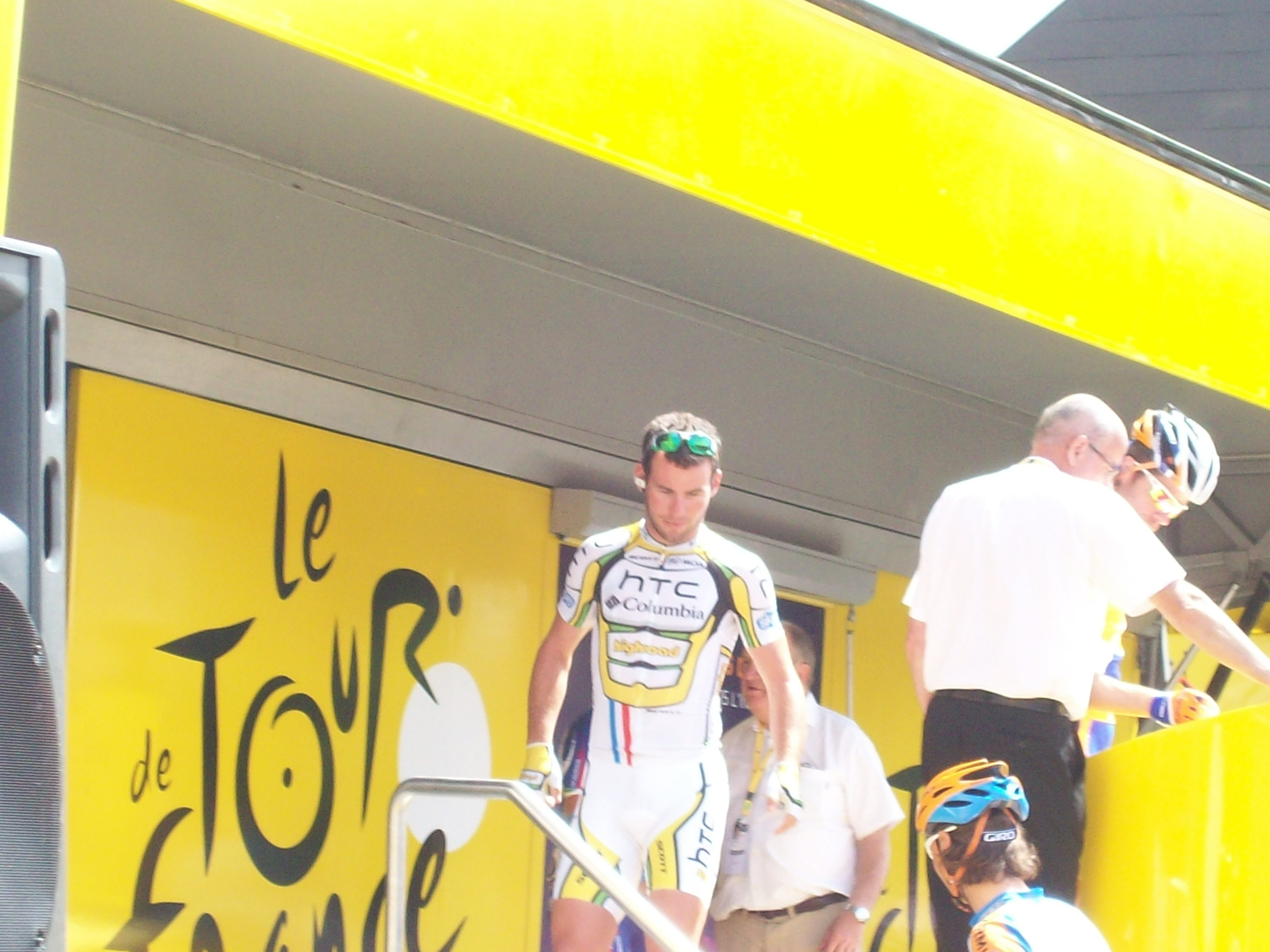 Mark Cavendish au départ de la 3e étape du Tour de France 2010 à Wanze, province de Liège, Belgique.